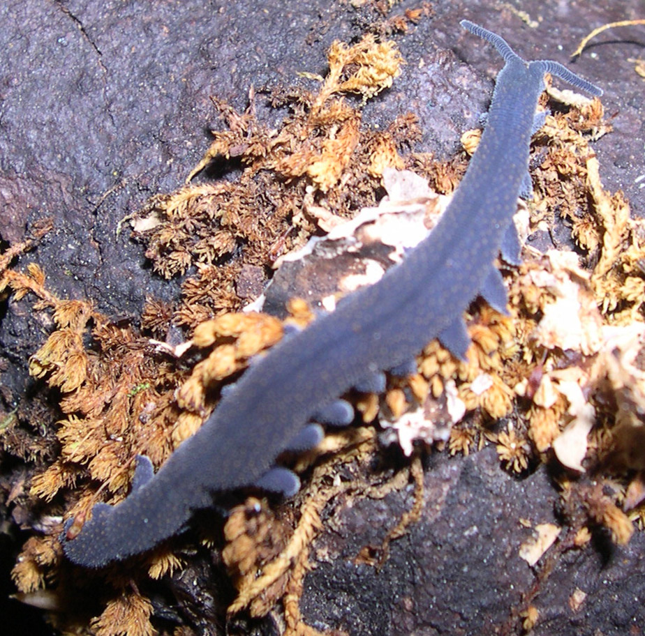 Peripatoides sp.